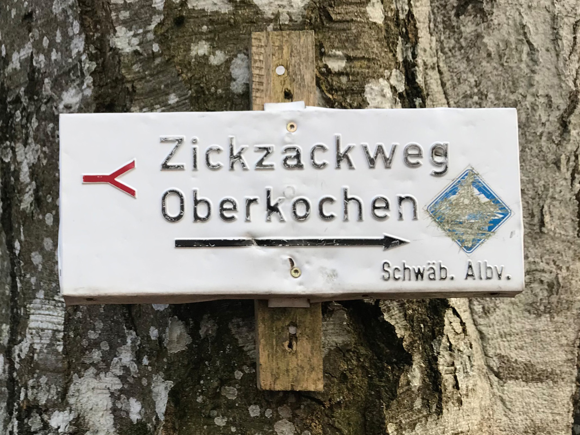 Volkmarsberg - Wegweiser des Zickzackwegs